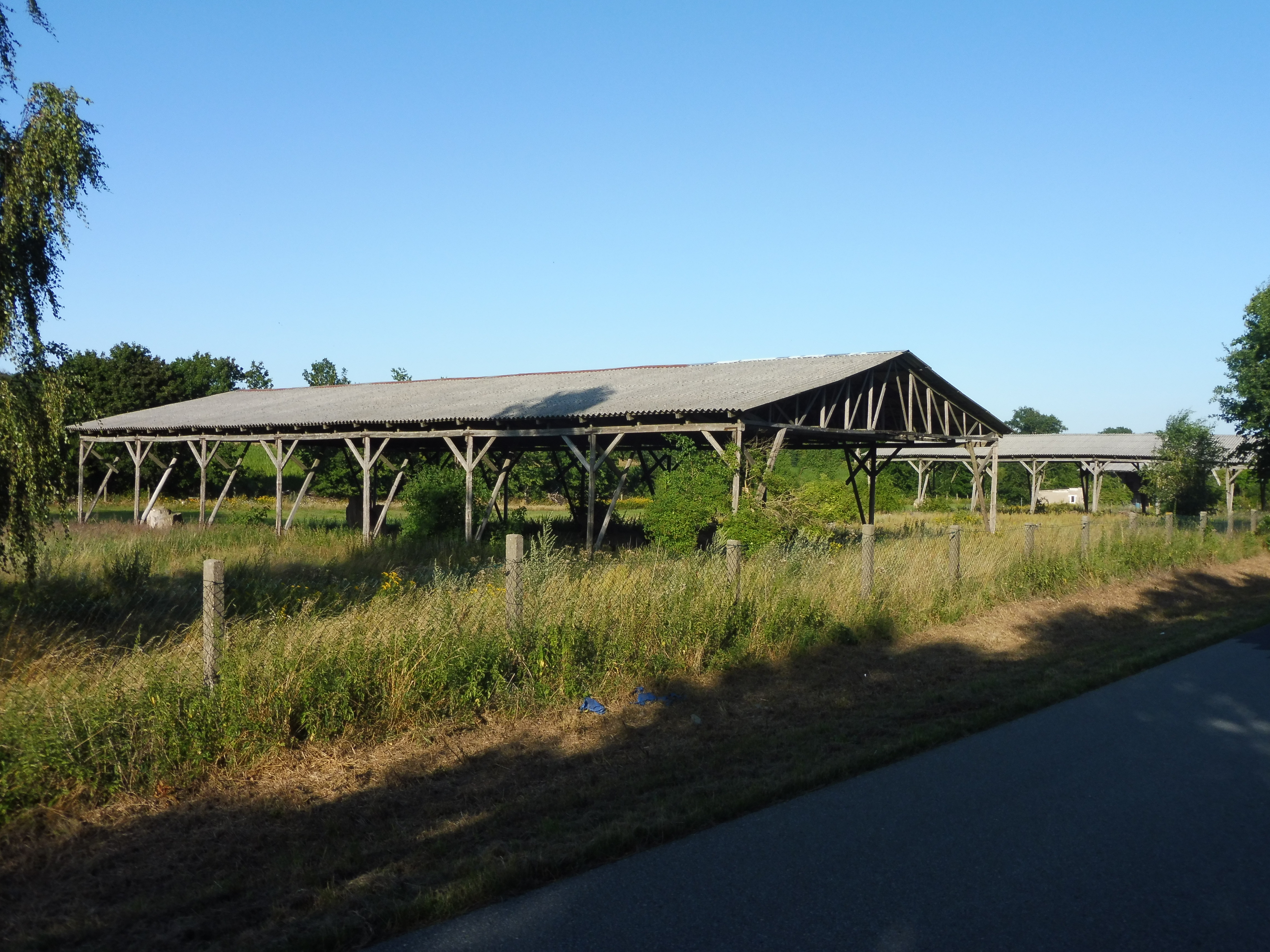 Ausgediente Unterstände für Landmaschinen